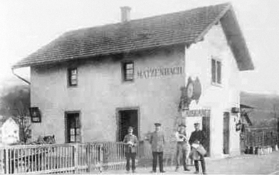 Bahnhof Eisenbach-Matzenbach (damals Matzenbach) im Jahr 1912.